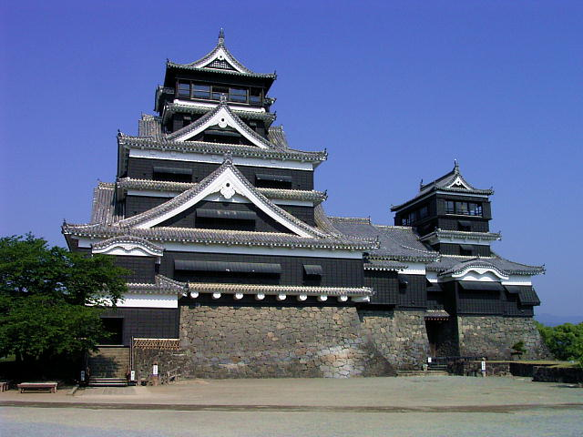 熊本城の大天守と小天守。